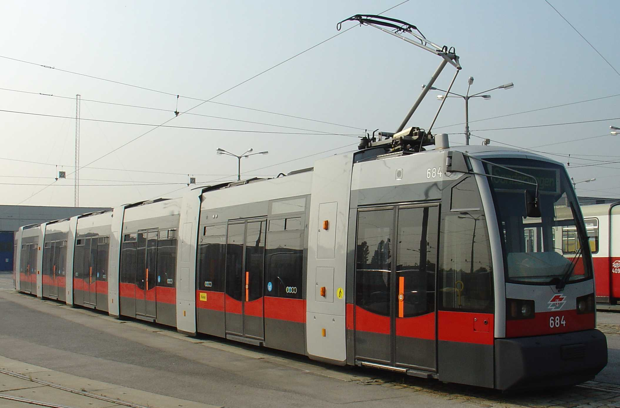 Straßenbahn ULF (ultra low floor) tram der Type B (langer ULF) in der Hauptwerkstätte der Wiener Linien. Aufnahme vom 13.10.2006, Vienna, Austria